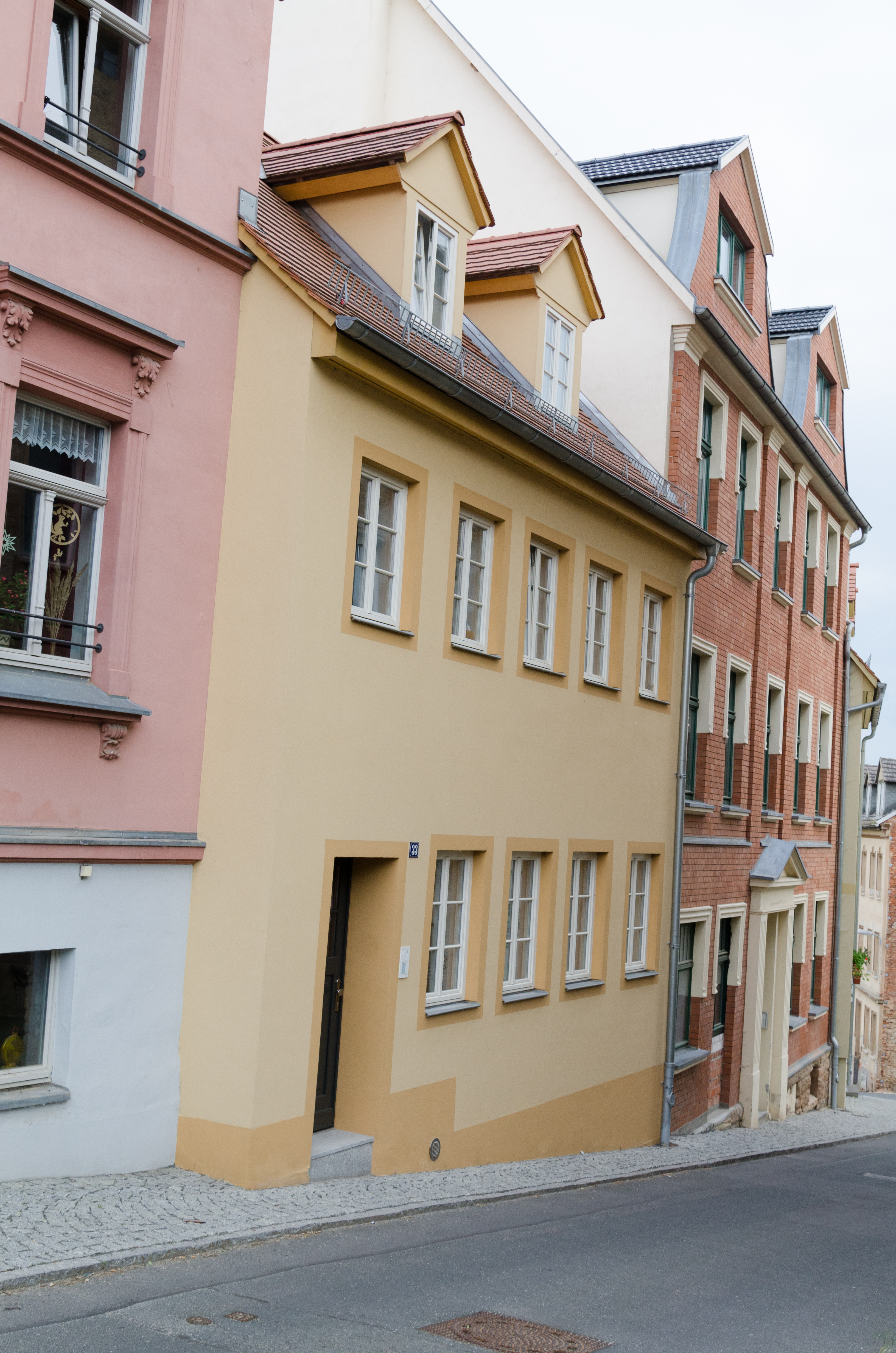 Zeitz, Scharrenstraße 33